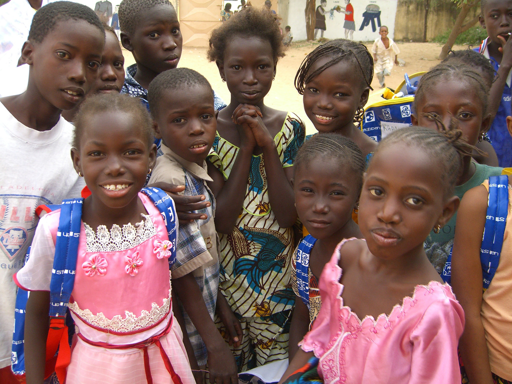 Ecoliers de Kaolack, Sénégal, dans le cadre du projet